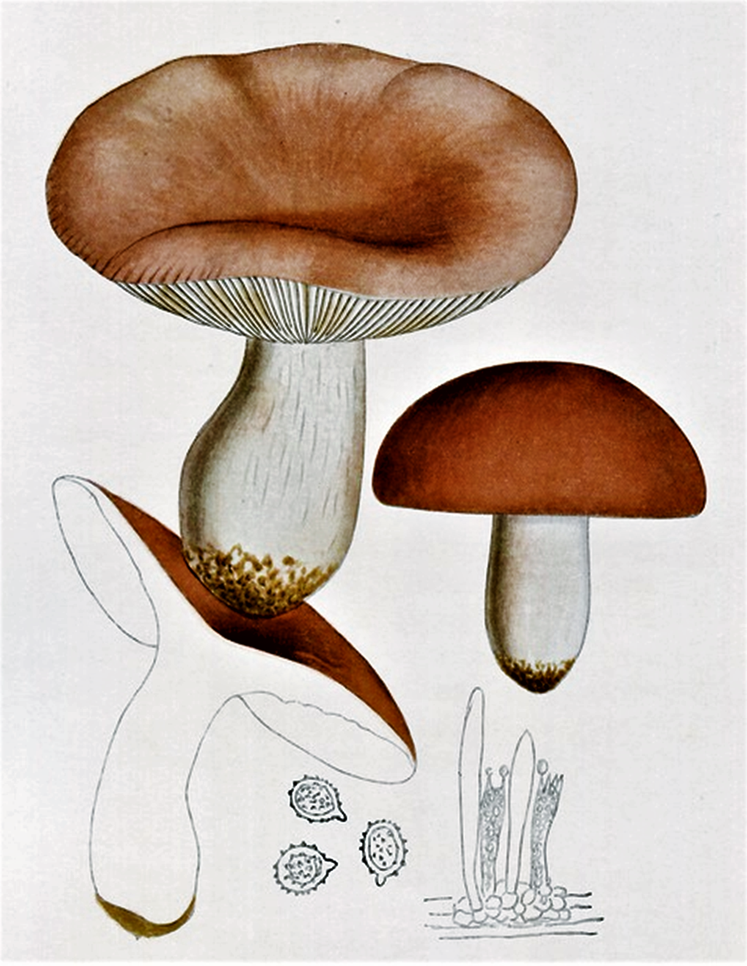 Giacomo Bresadola: Russula vesca Fr. (1836)